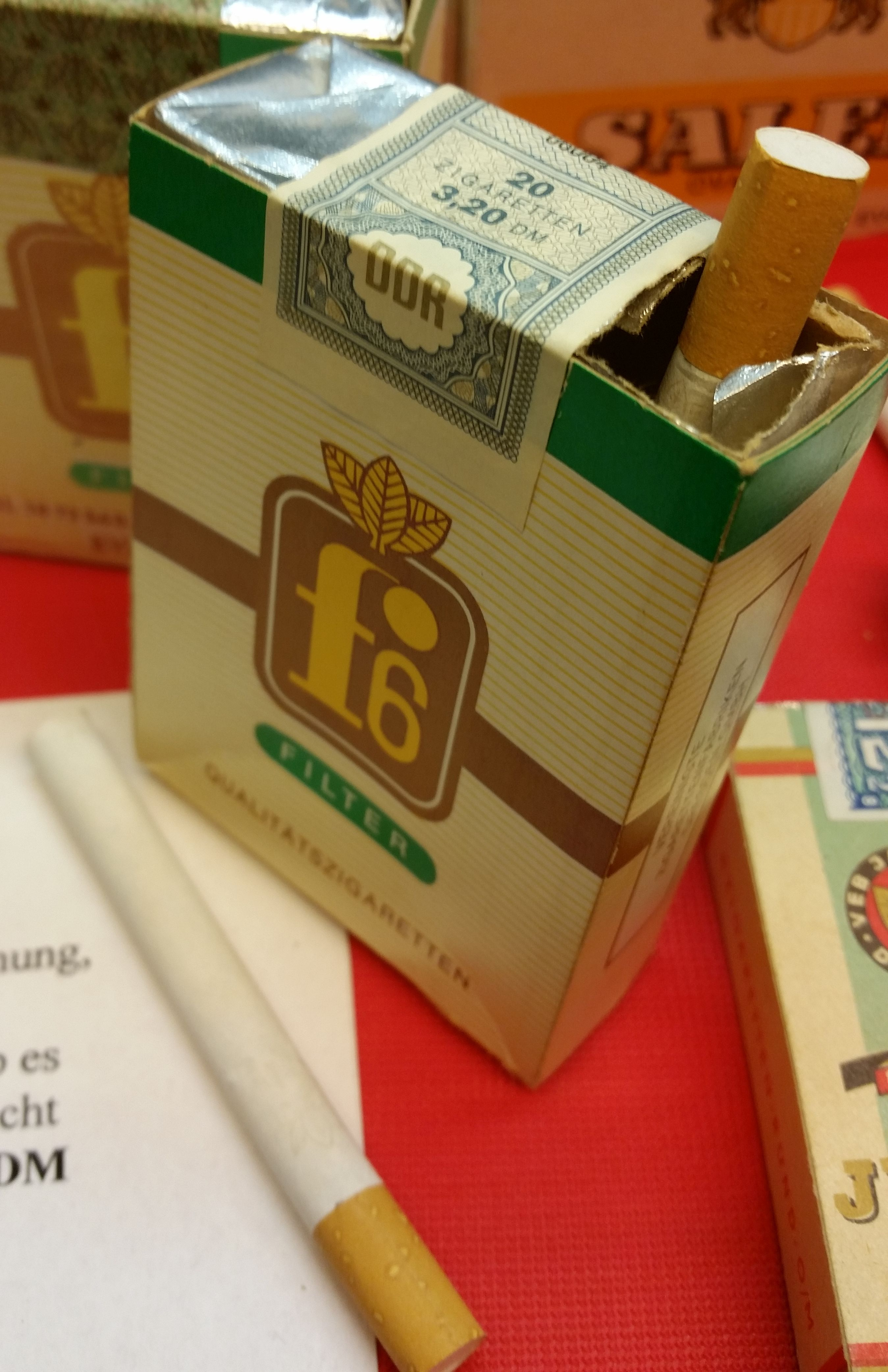 Zigarettenschachtel f6, nur kurze Zeit hergestellt mit einer DDR-Steuerbandarole und einem DM-Preis (3,20 DM) im DDR-Museum Pirna